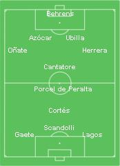 «Equipo ideal de todos los tiempos» del Club Social de Deportes Rangers